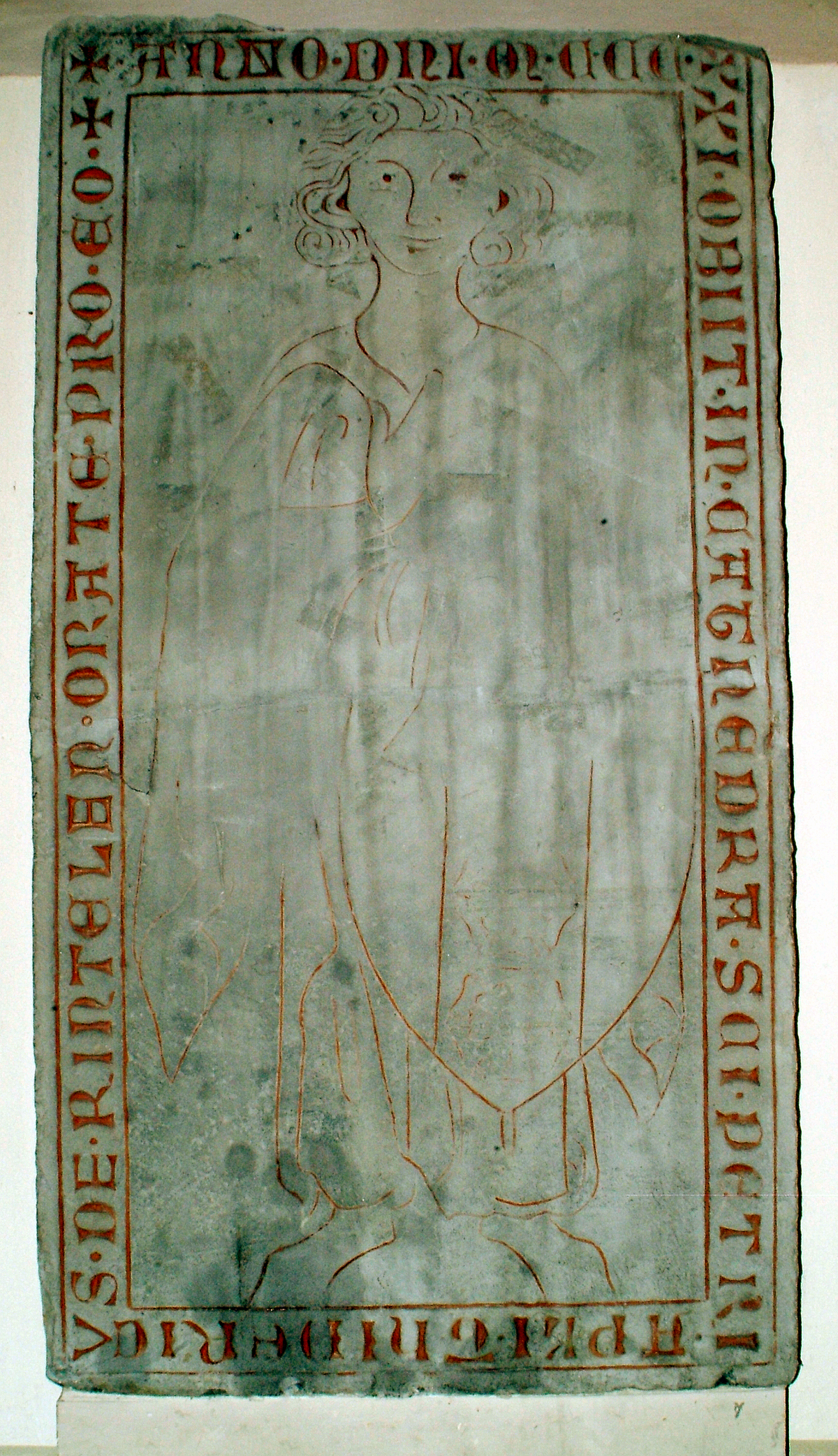 Die Grabplatte des Thidericus de Rintelen (auch: Didericus de Rintelen oder Dietrich von Rinteln), gestorben 1321-02-22 als Ritzzeichnung in der Kreuzkirche in Hannover ist das älteste erhaltene Grabdenkmal der Stadt Hannover ...